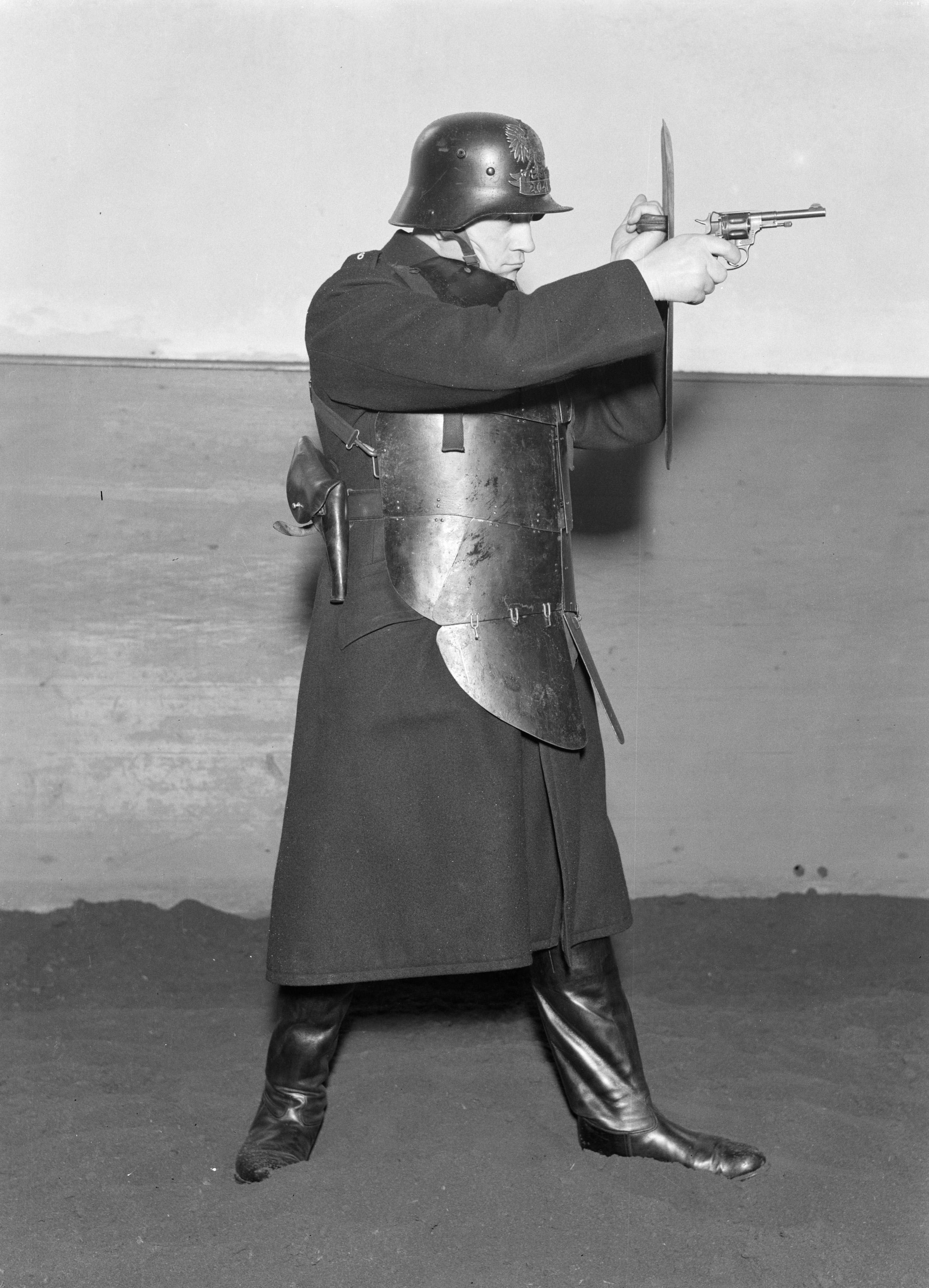 Collectie / Archief : Fotocollectie Van de Poll Reportage / Serie : Reis naar Polen Beschrijving : Warschau. Gehelmde politieagent met extra lichaamsbescherming tijdens een schietoefening met het pistool Datum : 1934 Locatie : Polen, Warschau Trefwoorden : helmen, politie, vuurwapens Fotograaf : Poll, Willem van de Auteursrechthebbende : Nationaal Archief Materiaalsoort : Glasnegatief Nummer archiefinventaris : bekijk toegang 2.24.14.02 Bestanddeelnummer : 190-1291